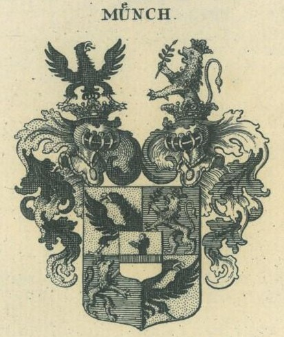 Bei der Erhebung in den Reichsadelsstand am 4. April 1731 vermehrtes Wappen der Familie von Münch auf Aystetten, Mühringen, Filseck etc.